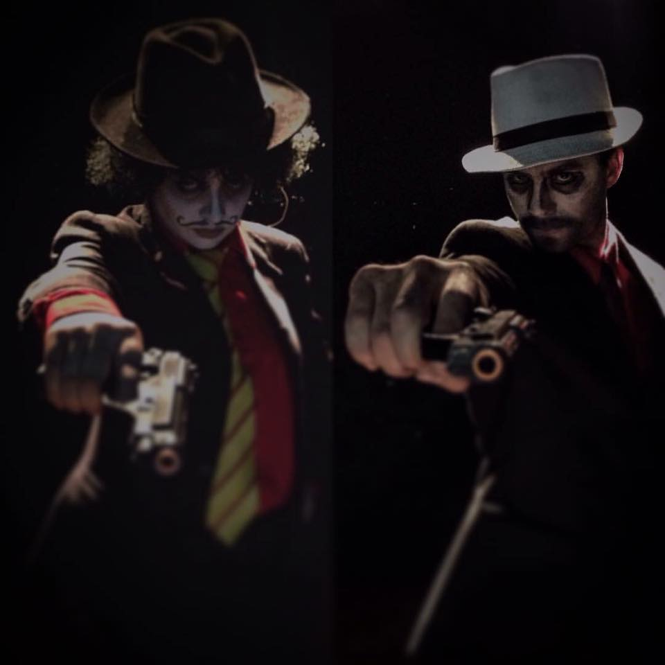 Jimmy el flojo y Matias, el sanguinario. La Opera de 3 centavos. Chile